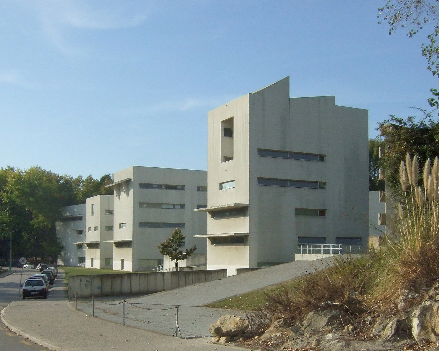 Faculdade de Arquitectura, Porto, Portugal